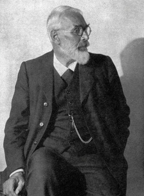 Jakob Bosshart (1862–1924) Lehrer und Schriftsteller. Fotografie von Camill Ruf, 1920